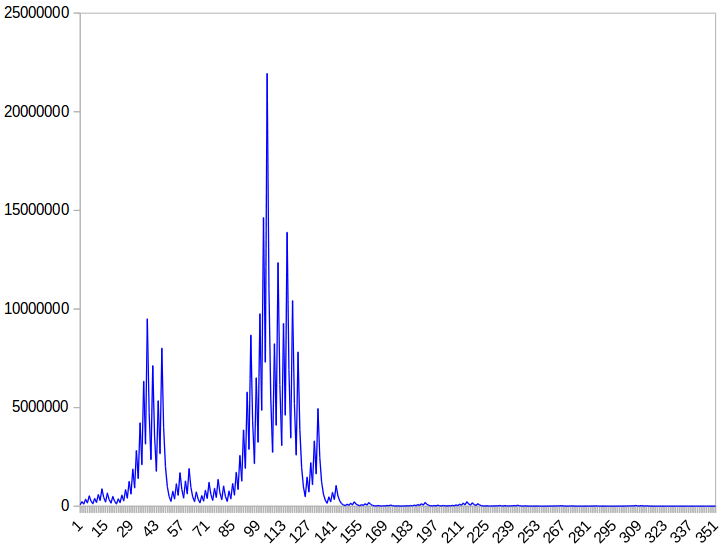 Bla